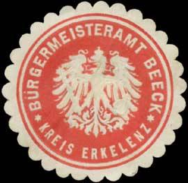 Sealing stamp Title: Bürgermeisteramt Beeck Kreis Erkelenz Description: rot, weiß, geprägt Place: Beeck size: 4 cm